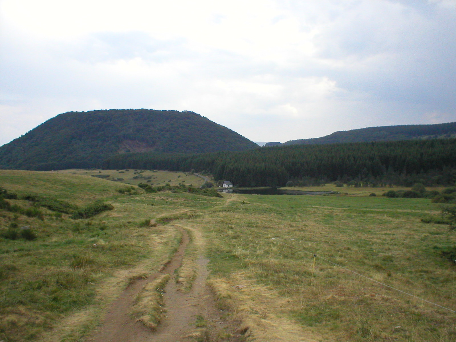 Puy de Montcineyre